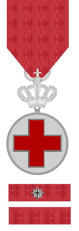 Regeringsmedaille Nederland 1910